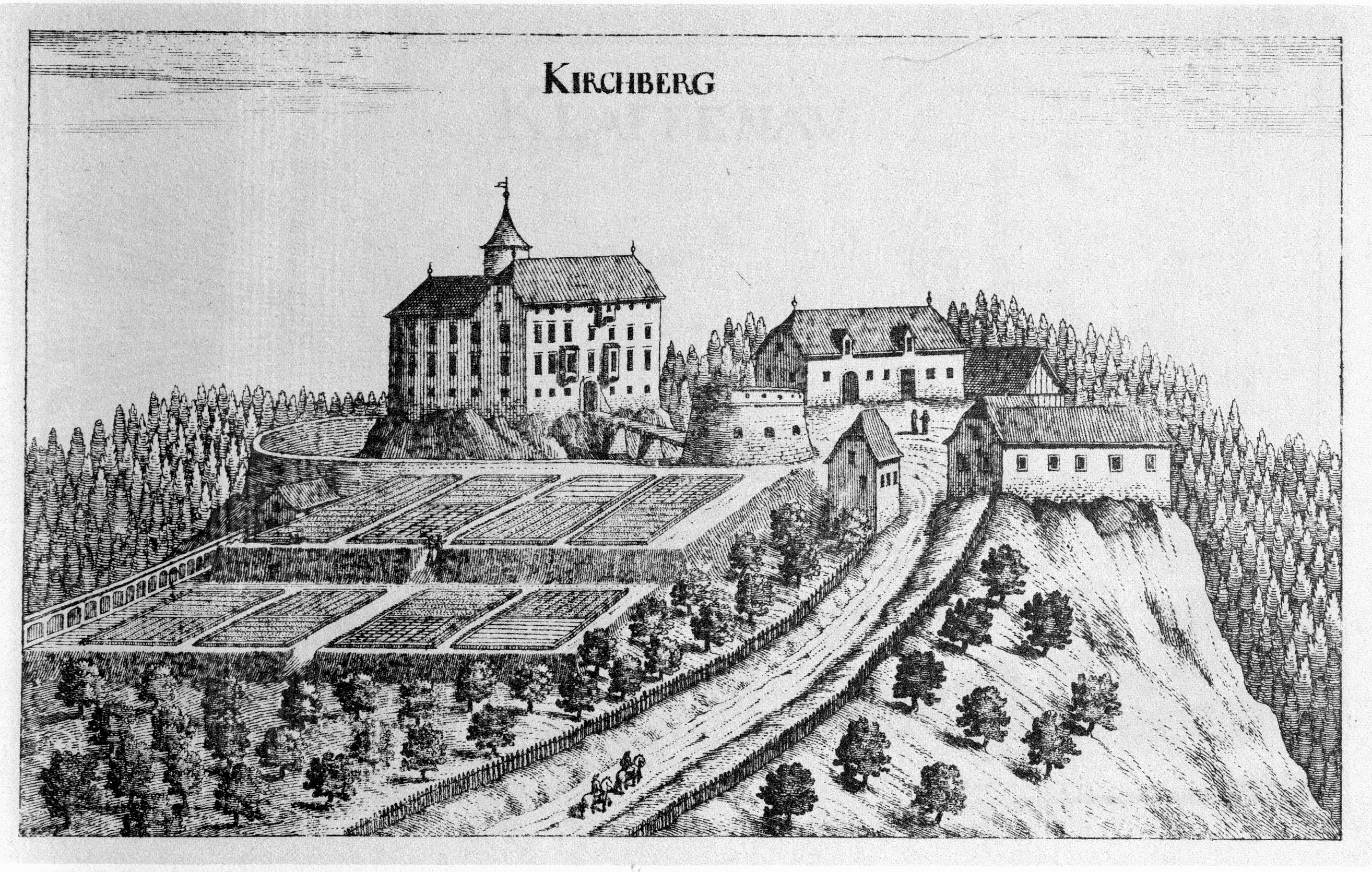 G. M. Vischers Käyserlichen Geographi, Topographia Ducatus Stiriae, Das ist: Eigentliche Delineation / und Abbildung aller Städte / Schlösser / Marcktfleck / Lustgärten / Probsteyen / Stiffter / Clöster und Kirchen / so es sich im Herzogthumb Steyrmarck befinden; Und anjetzo Umb einen billichen Preyß zu finden seynd Bey Johann Bitsch Universitäts Buchhandlern / Auff dem Juden=Platz bey der guldenen Saulen. Graz 1681 Die Nummerierung der Dateien folgt der alphabetischen Reihung der Ortsnamen